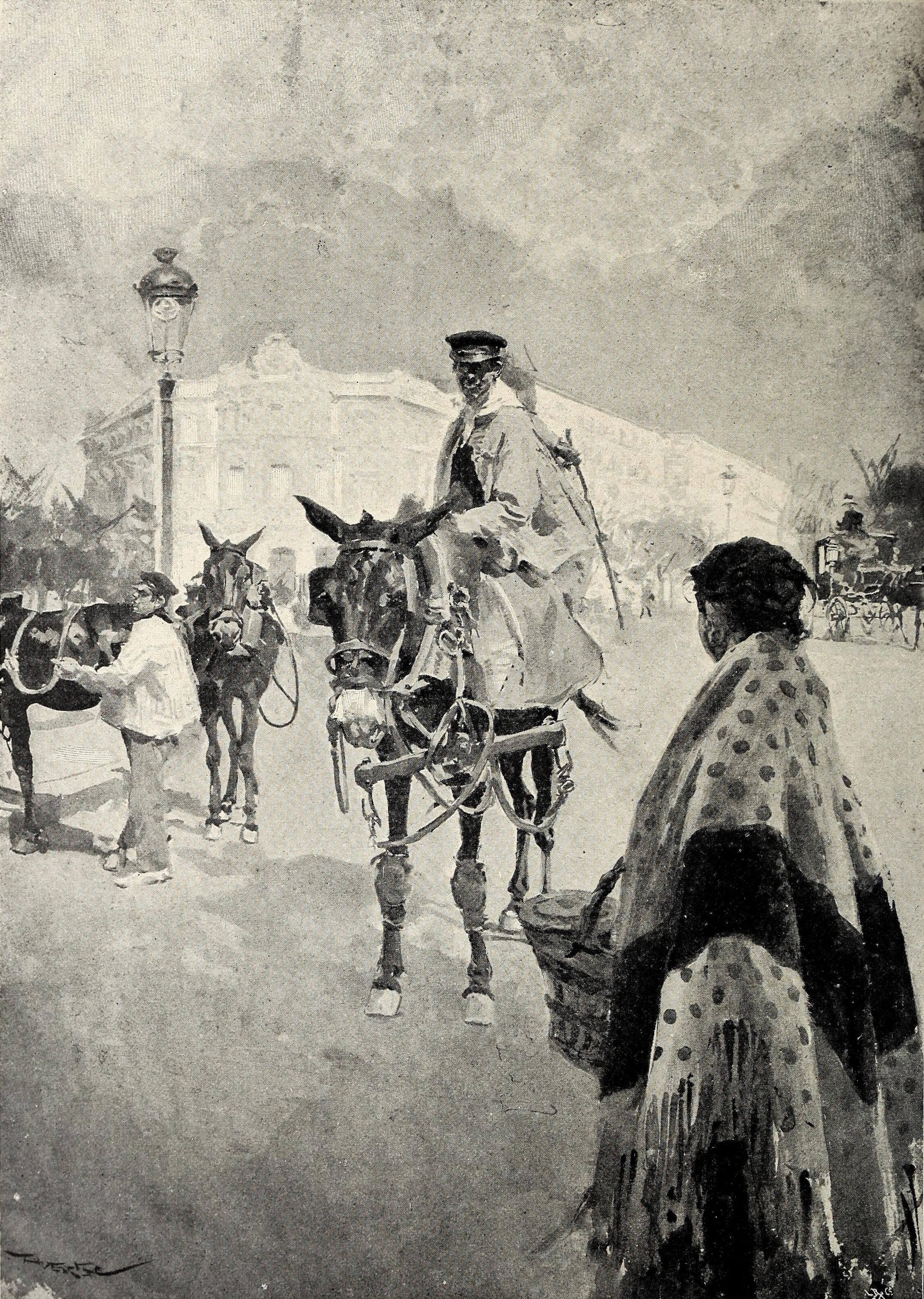 Páginas madrileñas. El encuartero.